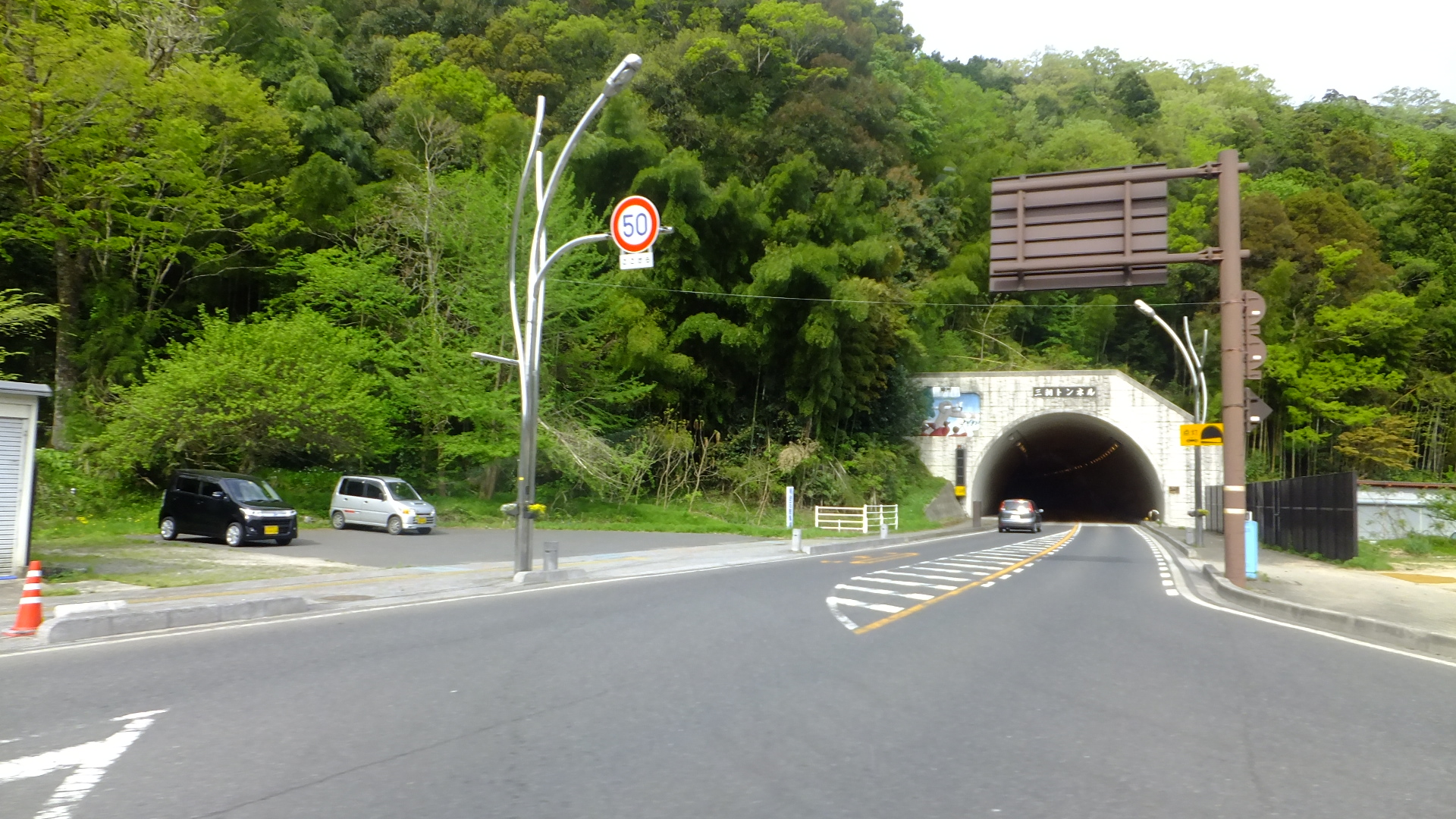 鳥取県東伯郡三朝町三朝 鳥取県道21号鳥取鹿野倉吉線